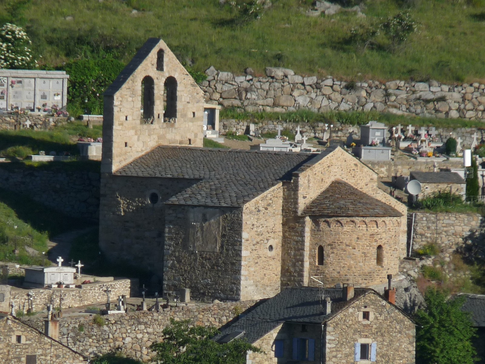 Ancienne église St-André, Angoustrine, P.O., France